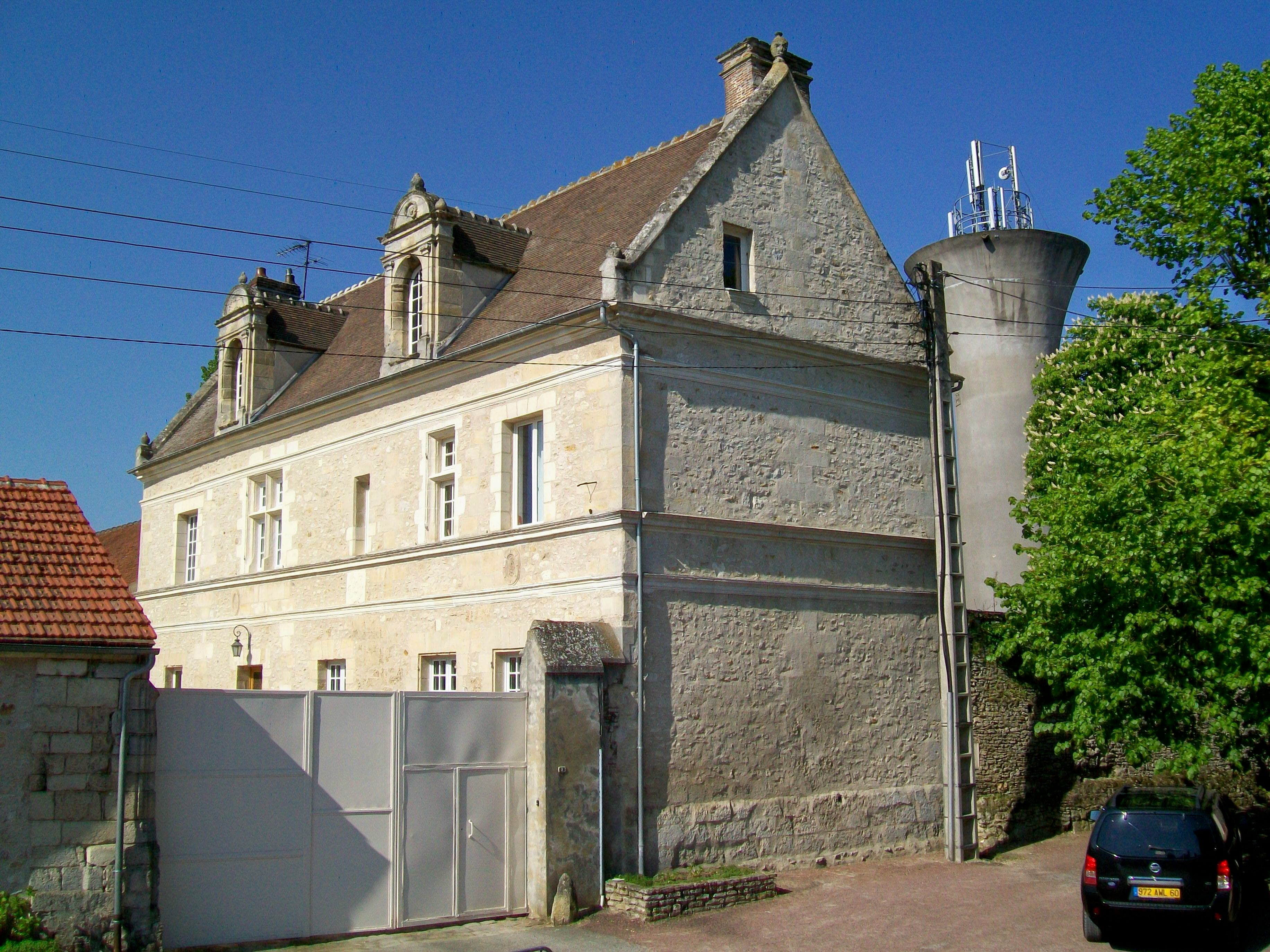 Manoir Renaissance de la ferme en face de la mairie. Les lucarnes avec leurs frontons curvilignes sont remarquables.